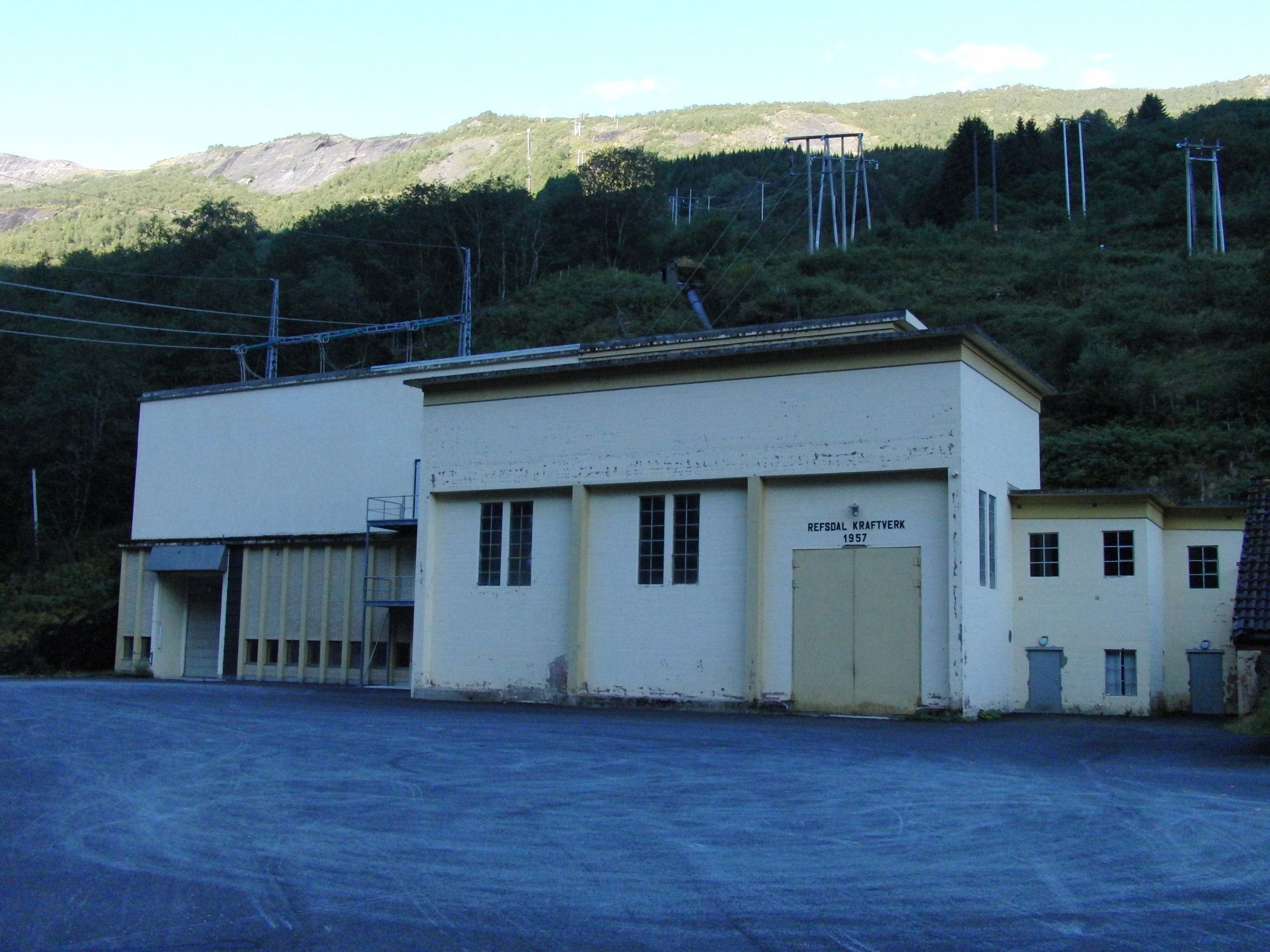 Refsdal kraftverk